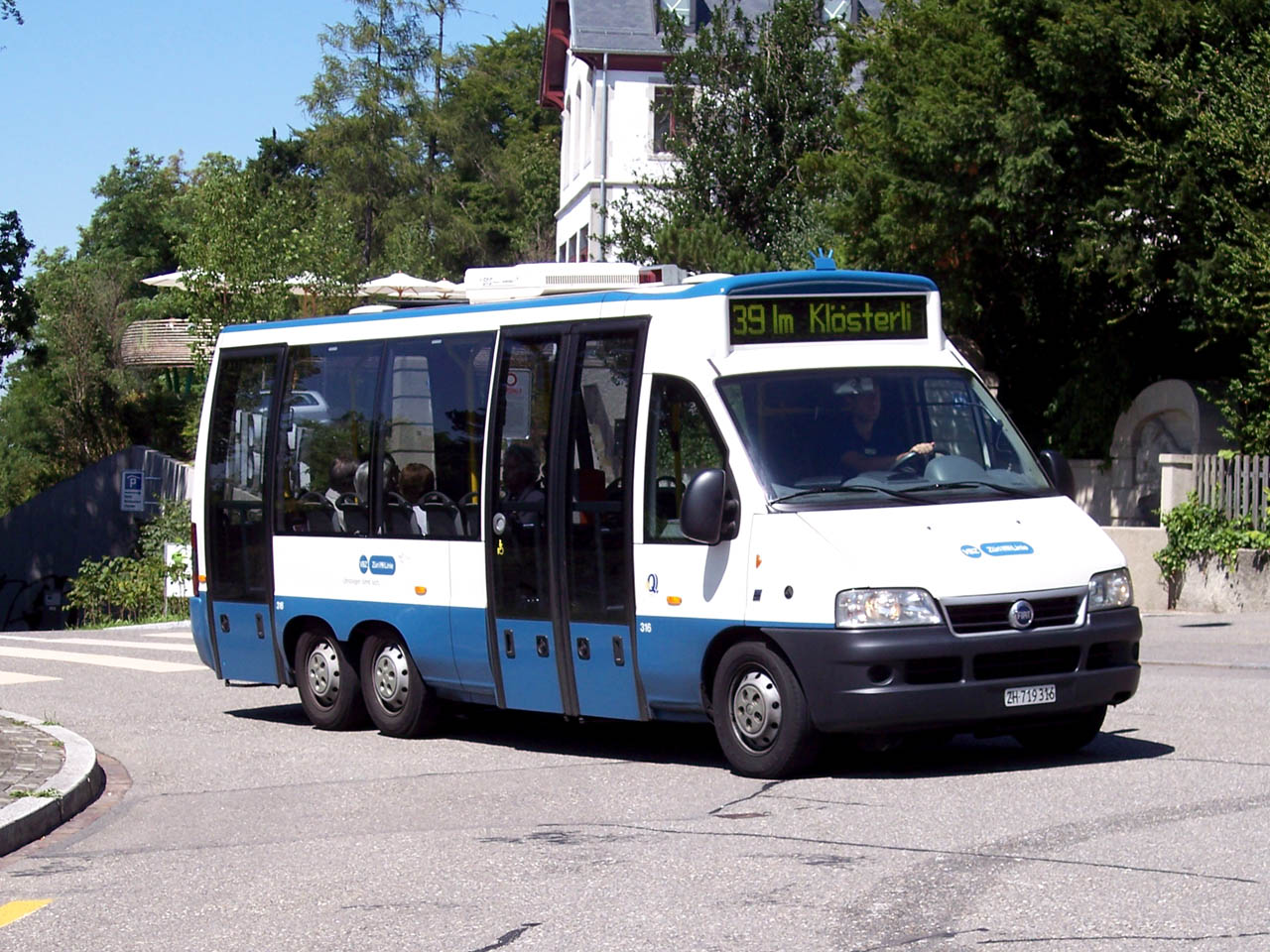 A EA KFB-bodied Fiat Ducato 2.8 JTD of Verkehrsbetriebe Zürich, Zürich, Switzerland on route 39 at Rigiblick.